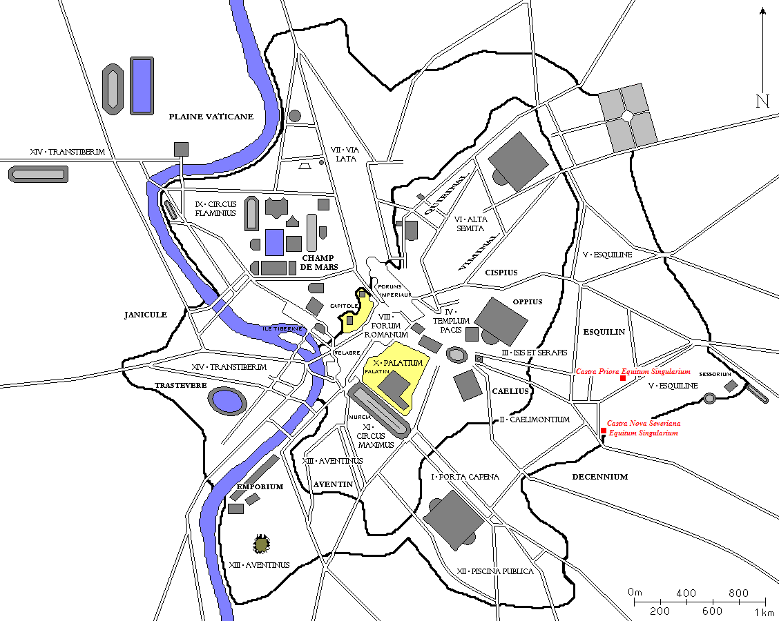 Plan de Rome redessiné à partir de diverses sources. Tous les bâtiments importants construits jusqu'à la fin de l'Empire romain sont dessinés, ainsi que les régions d'Auguste et les collines de Rome. Auteur : ColdEel En rouge, les casernes de la Garde des Equites Singulares